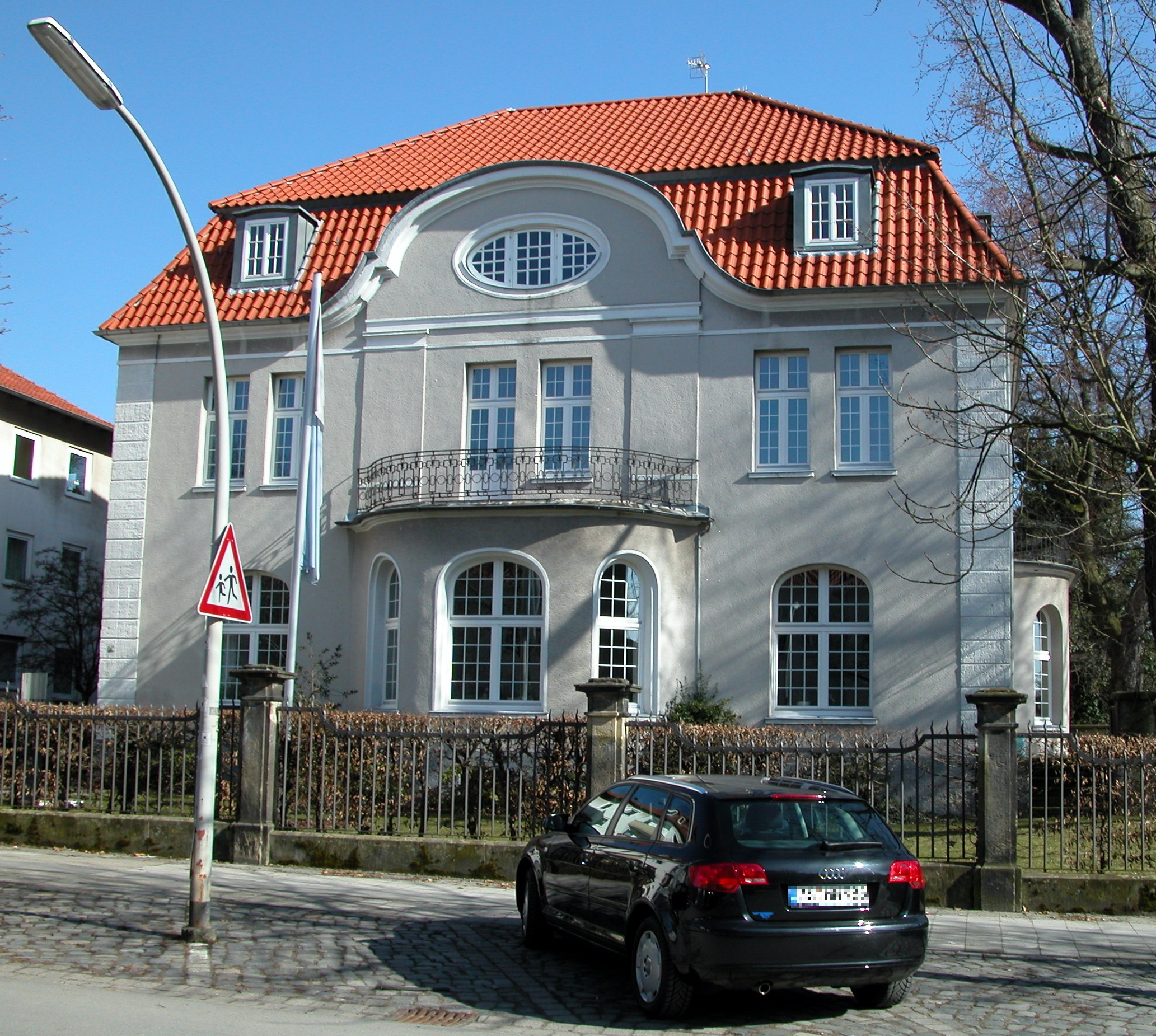 Braunschweig, ehemalige „Villa Felmy“, Fallersleber-Tor-Wall 16. Dienstvilla von Hellmuth Felmy und dessen Sohn Hansjörg Felmy.